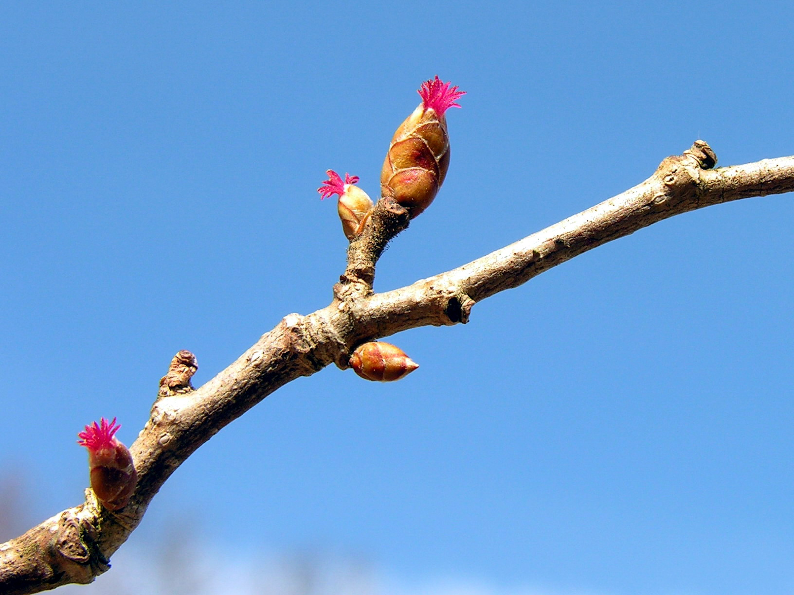 Lazdyno žiedai Foto: Algirdas, 2006 m. balandžio 16 d.